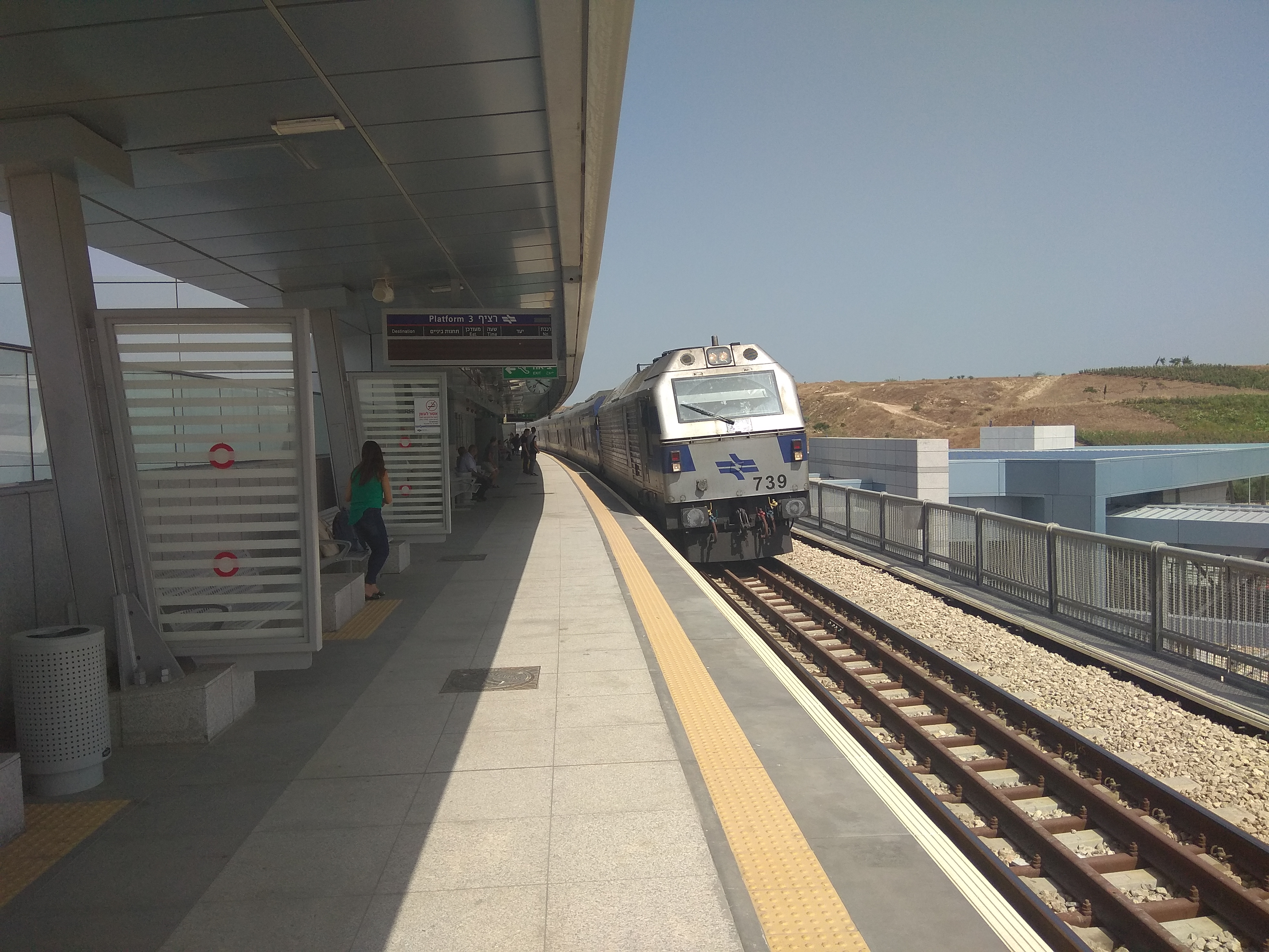 תחנת הרכבת מרכזית המפרץ, קו העמק